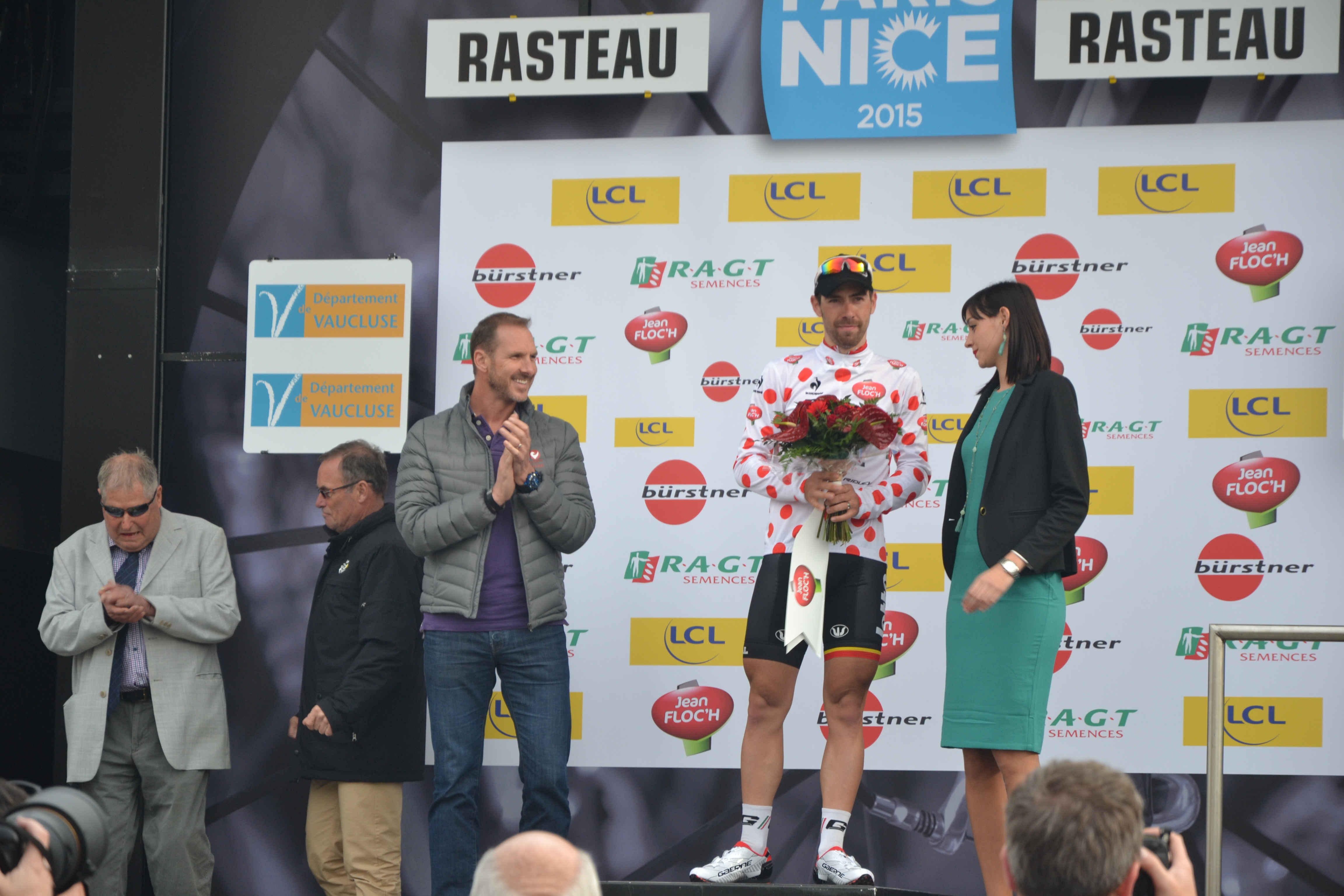 Lors de l'arrivée de l'étape Saint-Etienne - Rasteau du Paris - Nice 2015